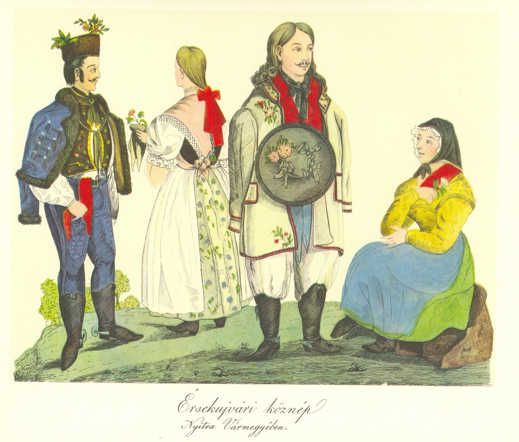 Érsekújvári köznép Nyitra vármegyében